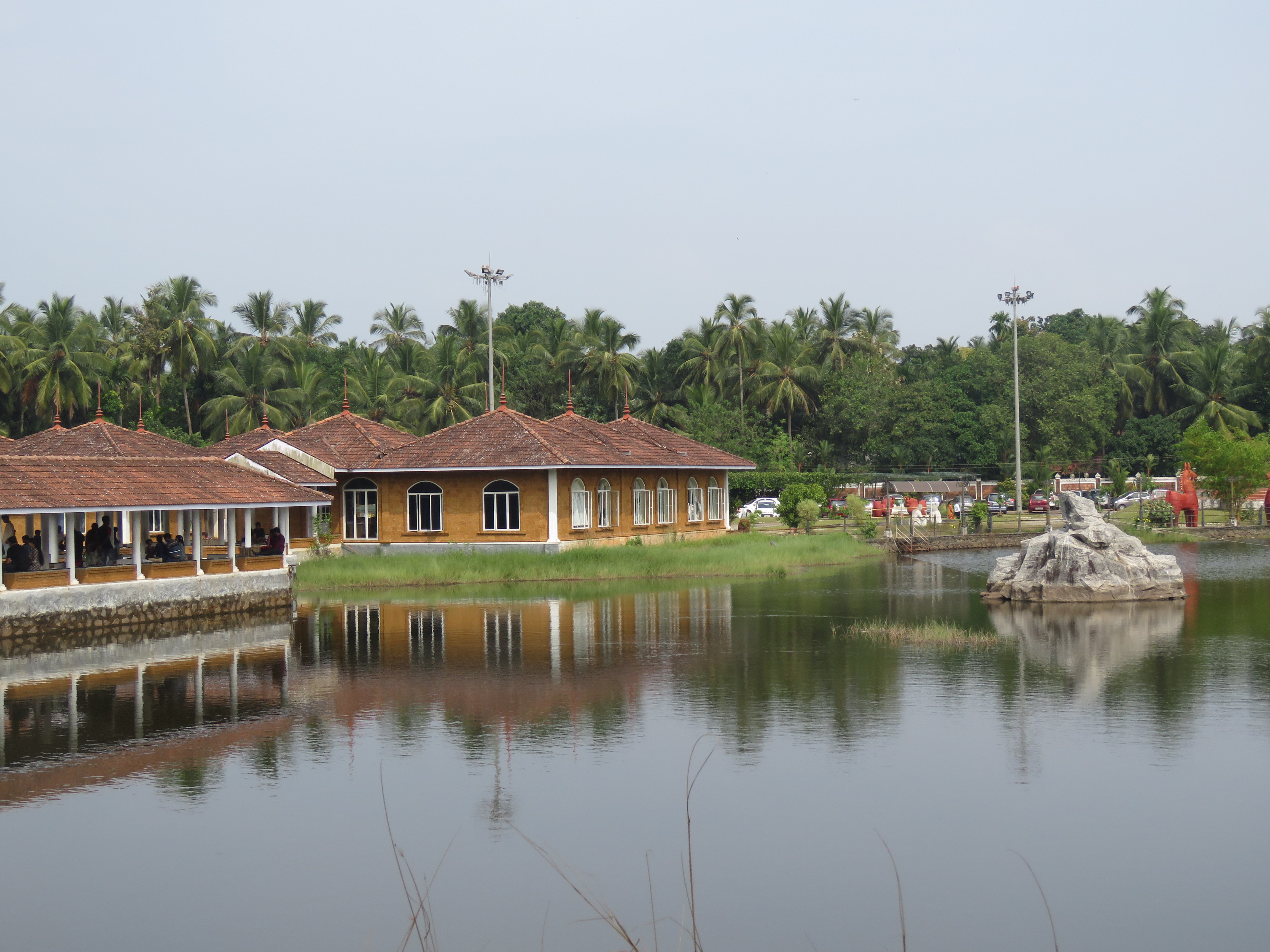 Photos taken by Vinayaraj